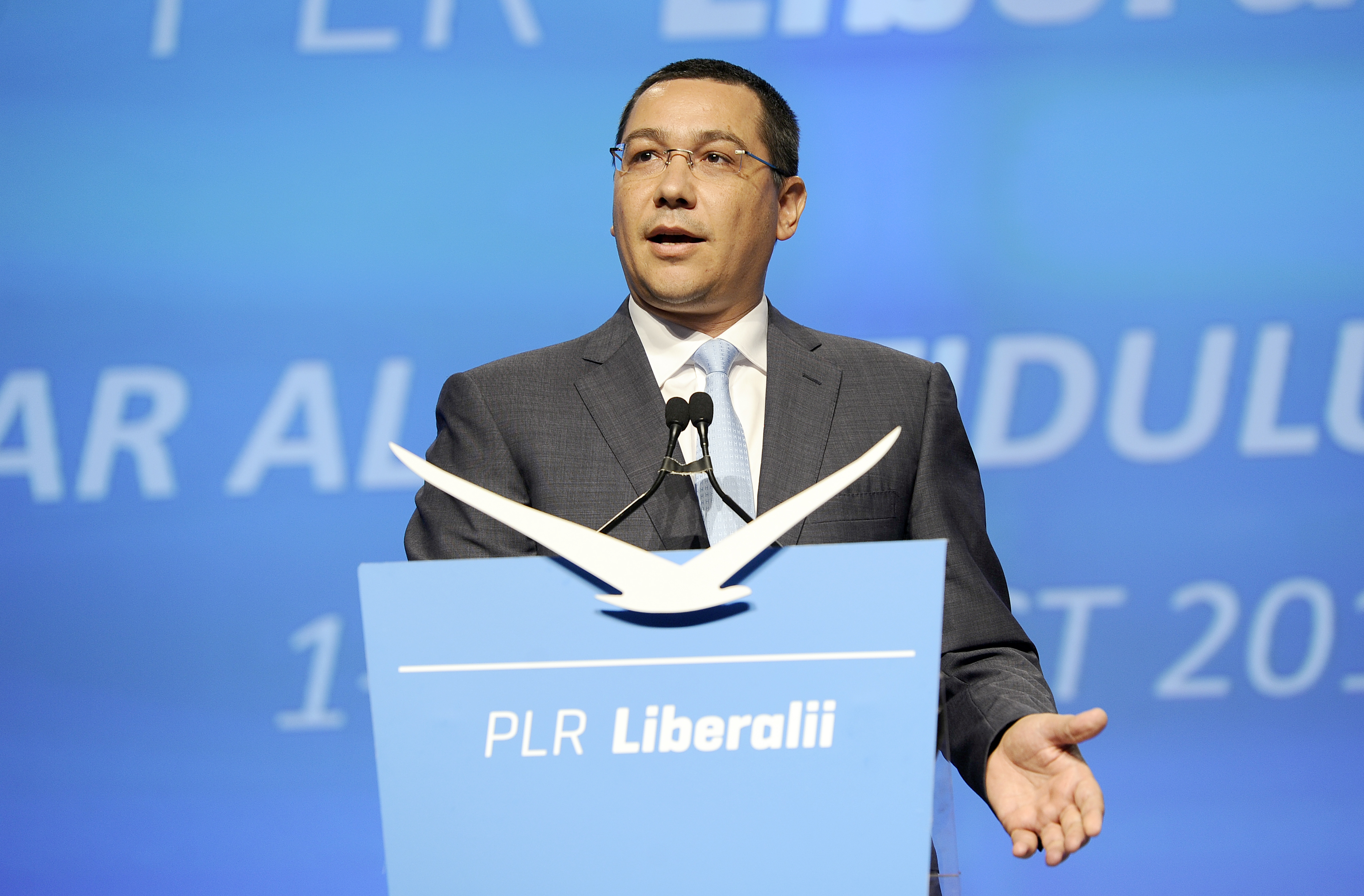 Victor Ponta la Congresul PLR - 01.08 (2)